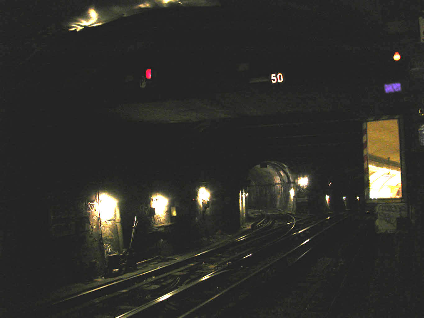 Station République (ligne 5), raccordement de la ligne 5 vers la ligne 8 du métro de Paris, France.